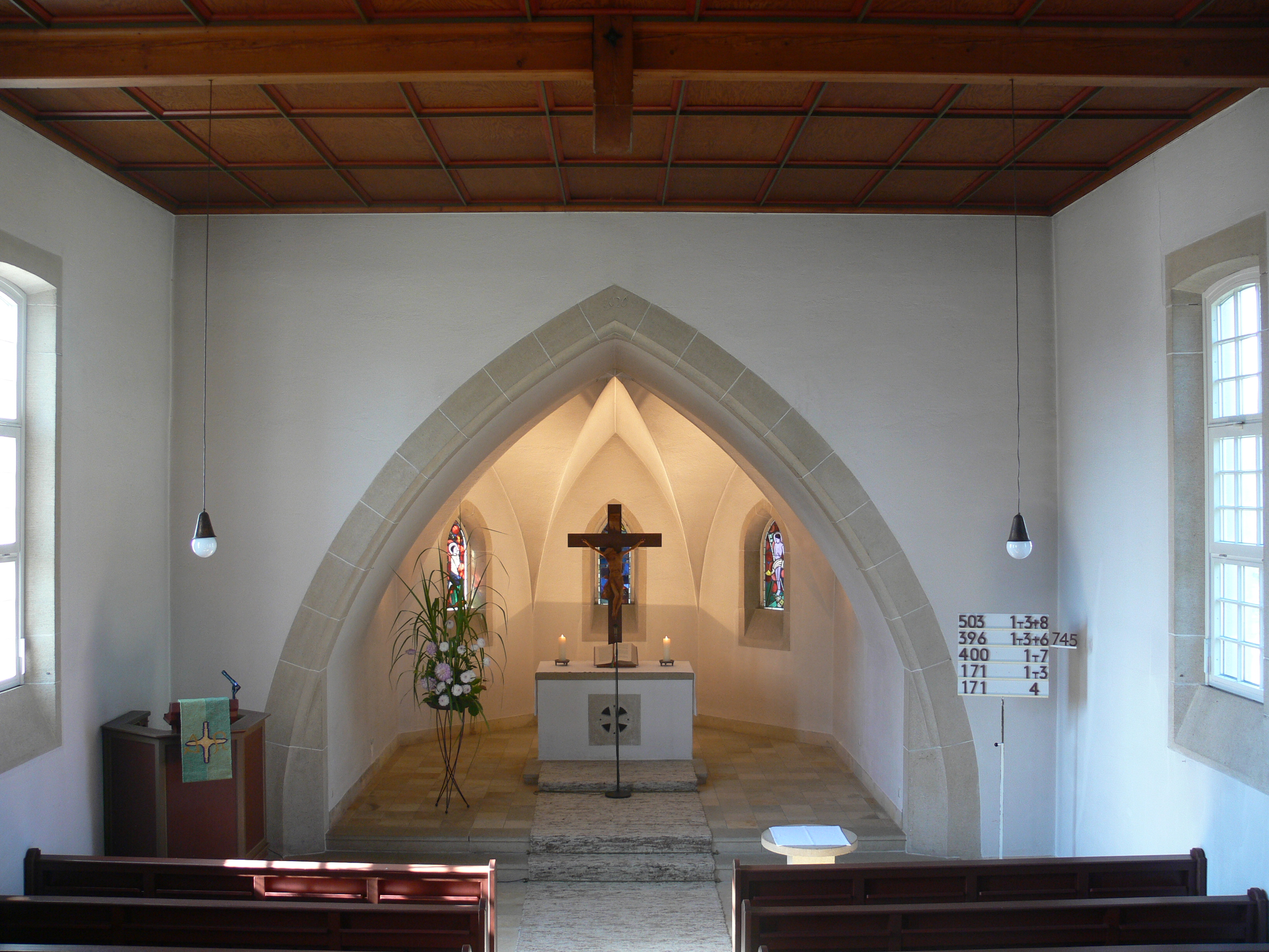 Ravensburg, Germany: Evangelische Kirche Bavendorf. Architekt: Prof. Wilhelm Jost. Erbaut etwa 1926.